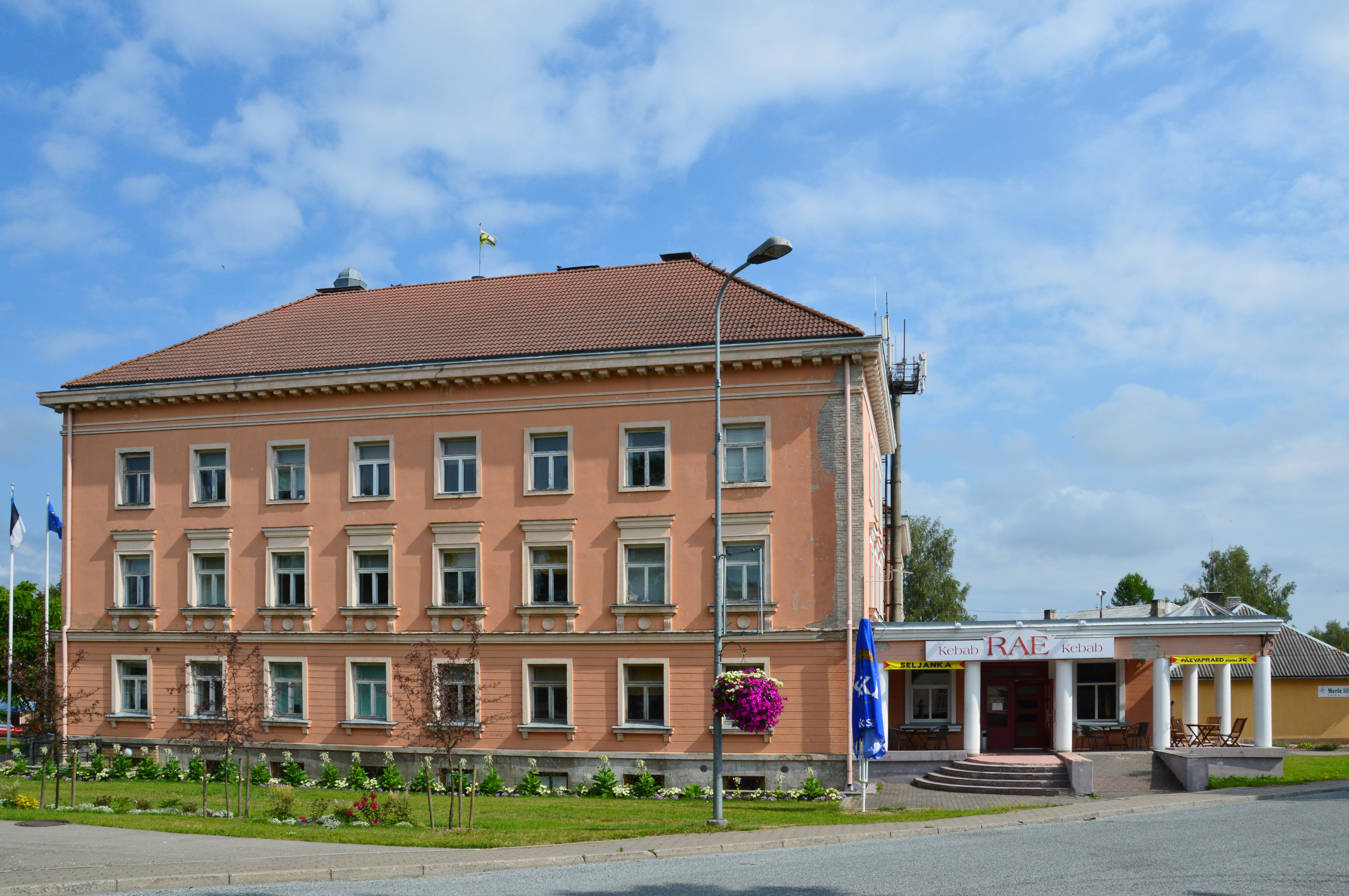 Otepää linnavalitsuse hoone